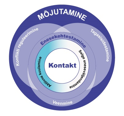 baasilise suhtlusoskuse - aktiivse kuulamise - seosed ja asukoht oskuste skeemil